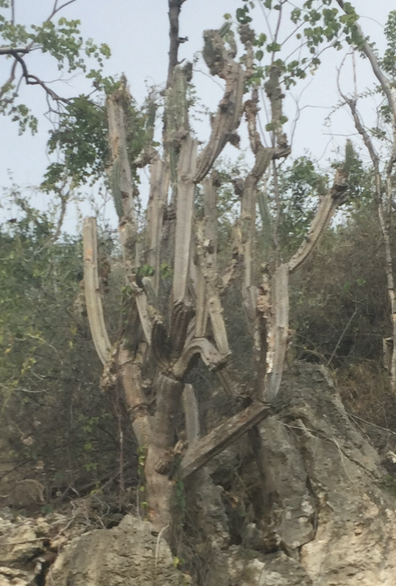 Cactus en el Bosque Seco de Guánica, Puerto Rico